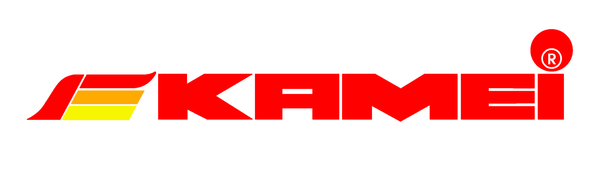 Kamei Logo verwaltet.